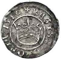 Półgrosz koronny Zygmunta Starego. Awers. autor: mzopw